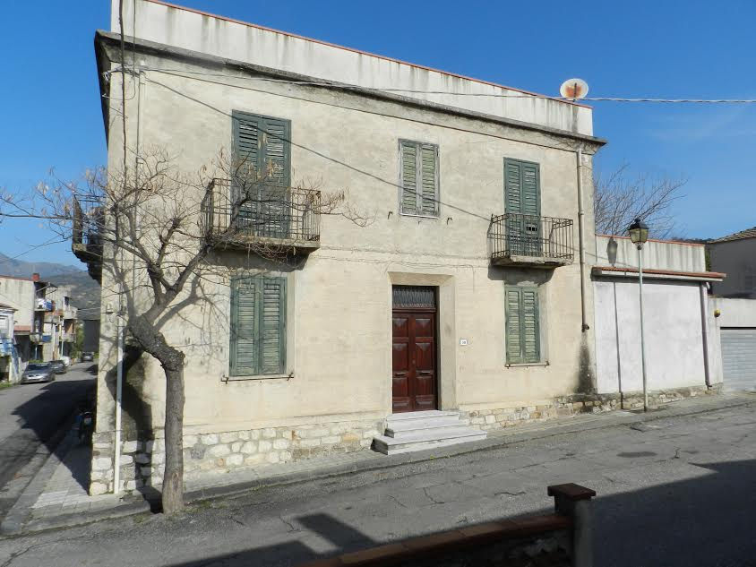 Casa natale del prof. Achille Sicari a Bruzzano Zeffirio